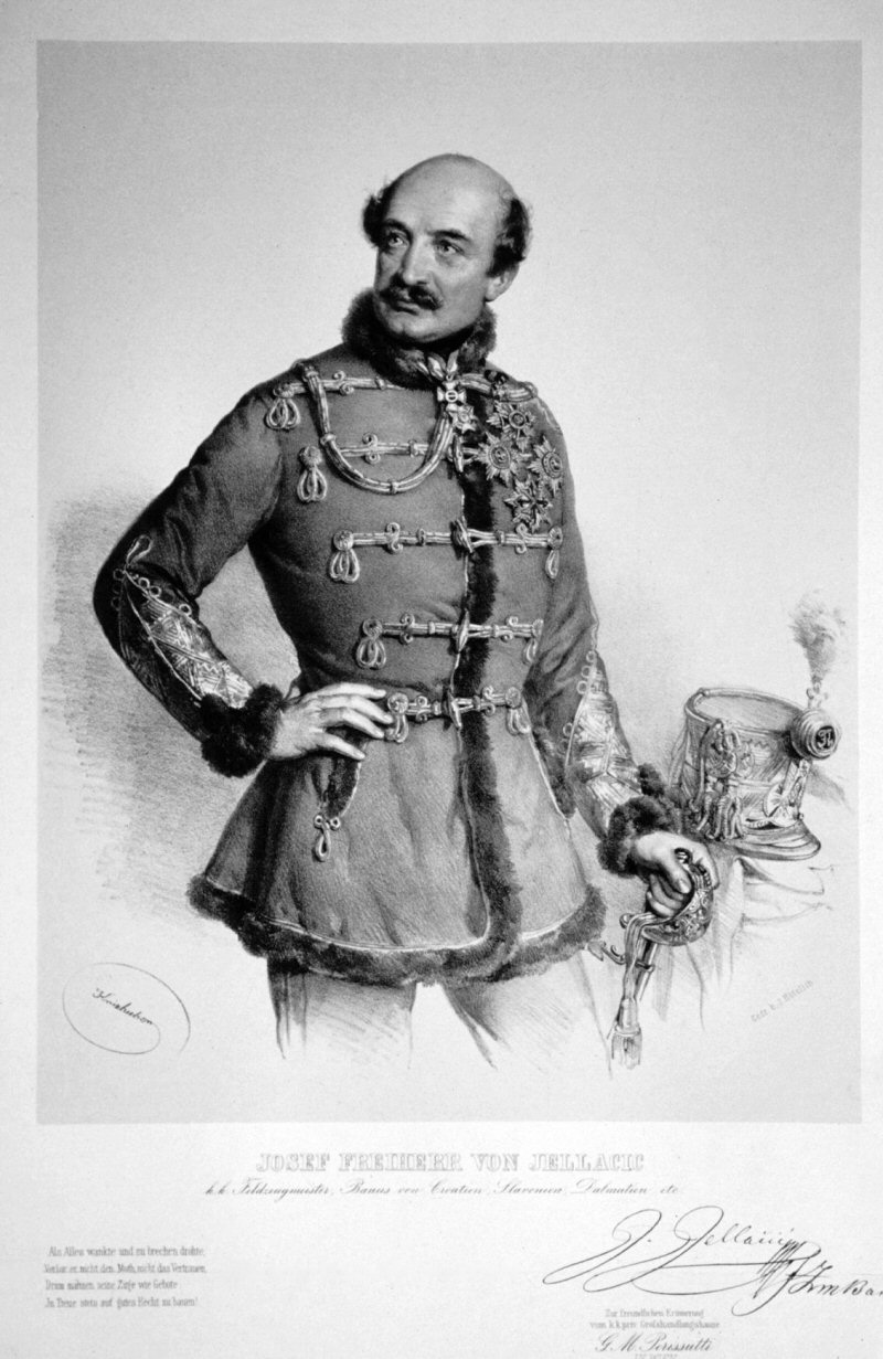 Josef Jellačić, Lithographie von Joseph Kriehuber